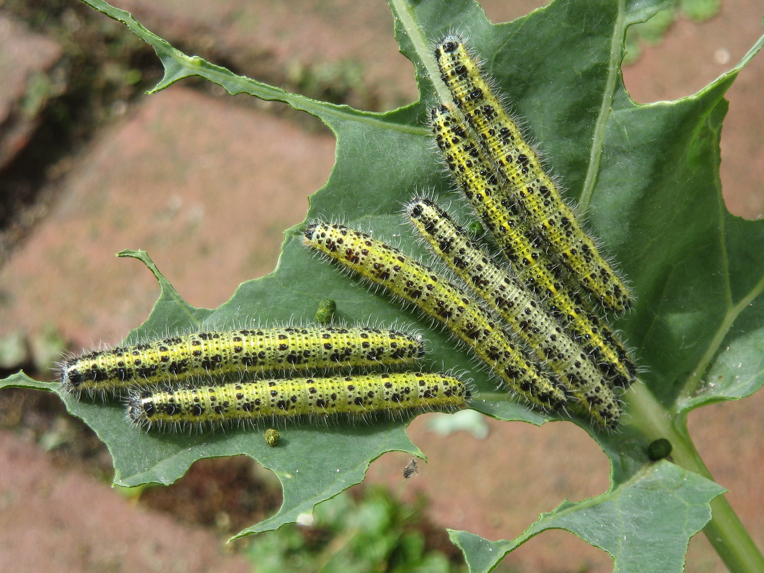 Raupen des Großen Kohlweißlings auf Kohlrabiblatt